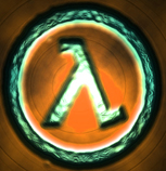 Letra do alfabeto grego construída utilizando o Photoshop e de domínio público.